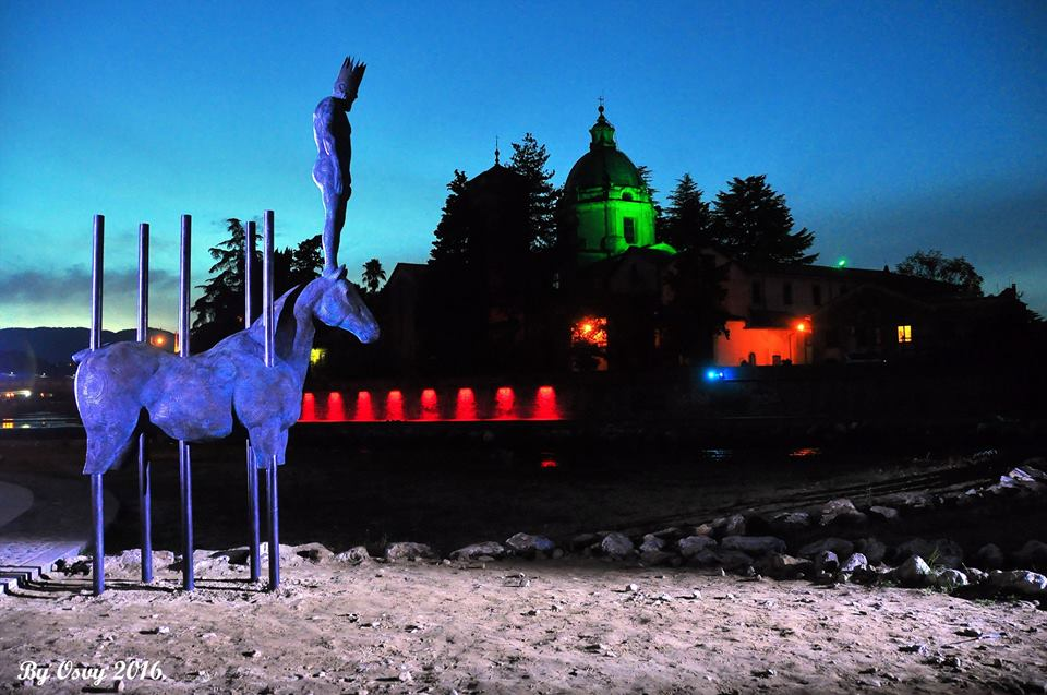 Monumento di Re Alarico nel centro storico di Cosenza